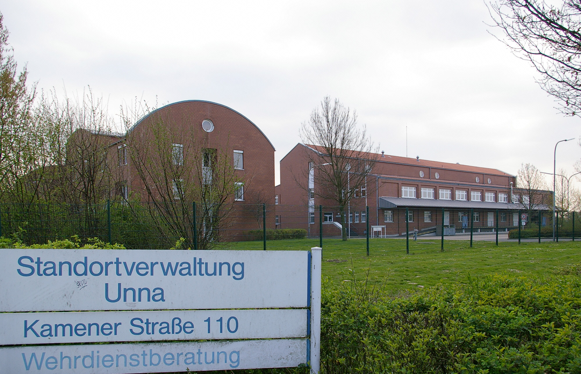 Unna, Standortverwaltung der deutschen Bundeswehr im Ortsteil Königsborn im April 2007. Die Gebäude sind 2008 einer privaten Nutzung zugeführt worden.